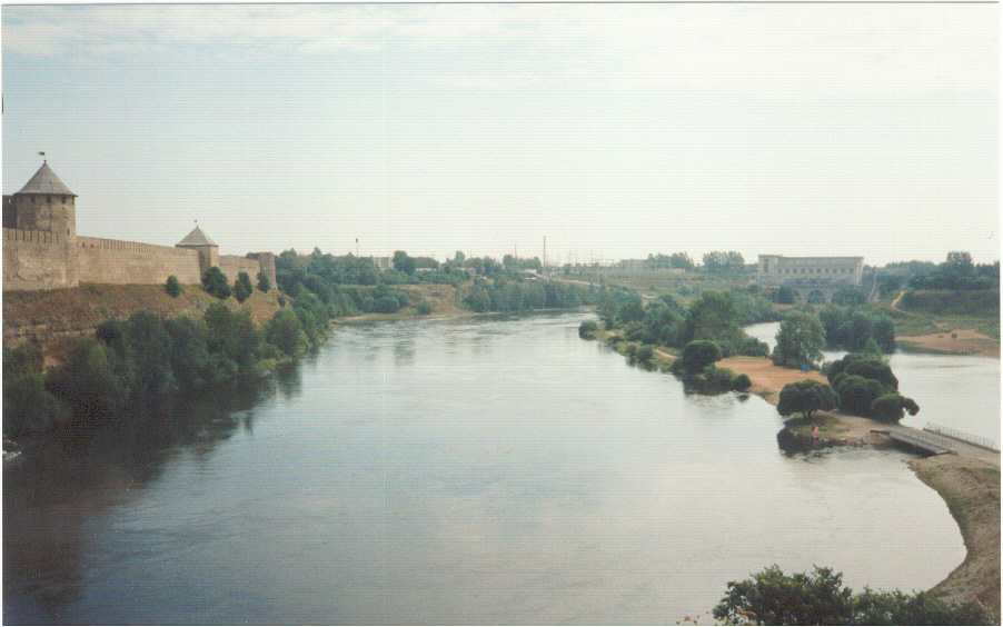 Estisk-russisk grense ved Narva